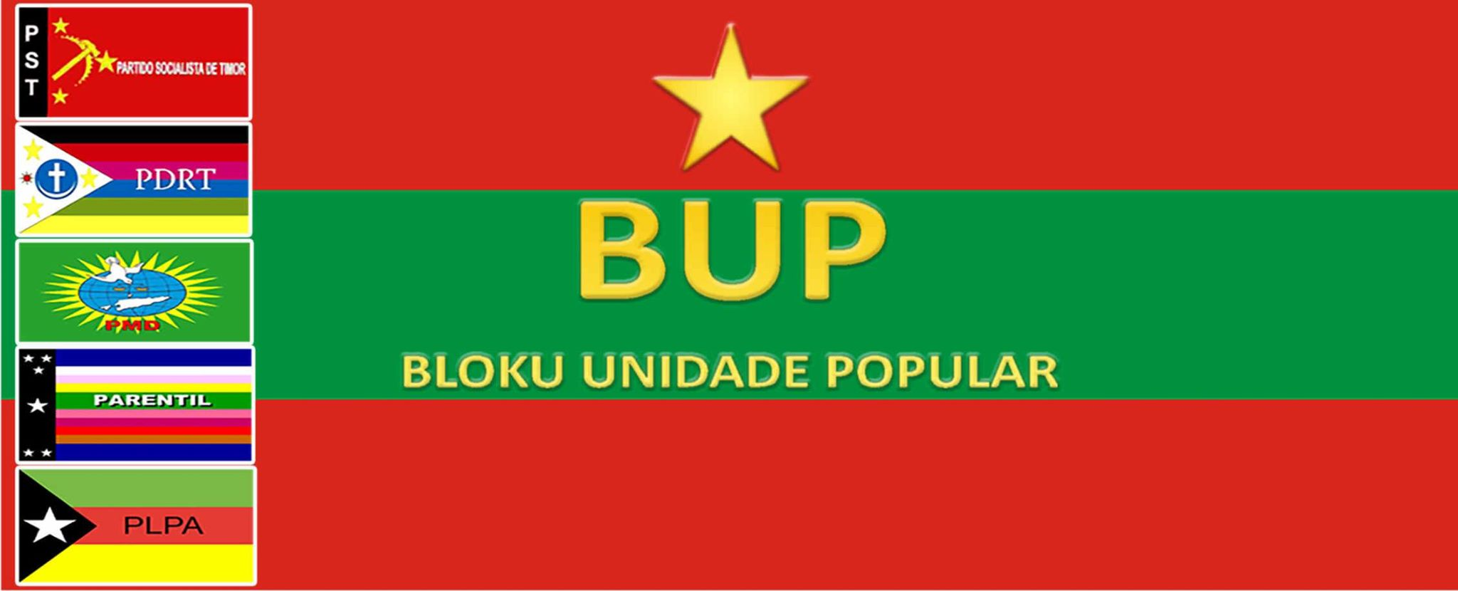 Tetun: Bloku Unidade Popular